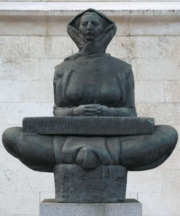 Povijest Hrvata Ivana Meštrovića iz 1932. godine.